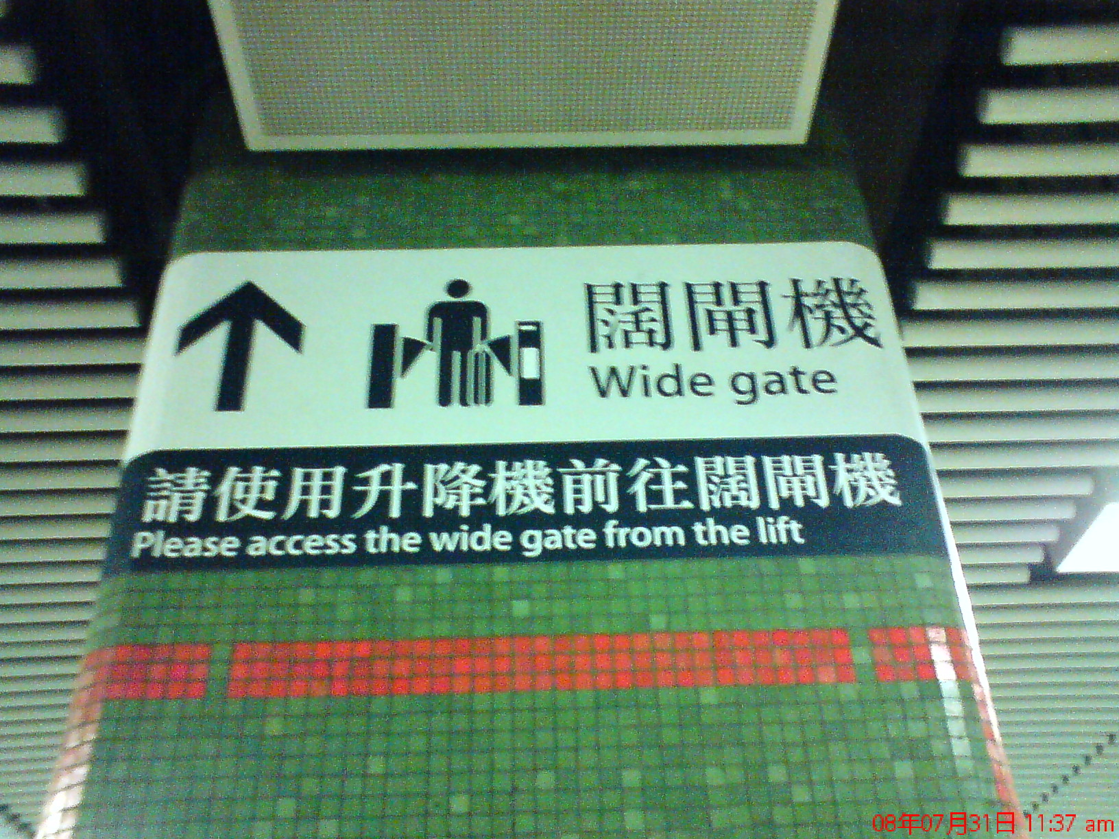 中文（香港）: 港鐵樂富站月台內的「闊閘機」指示